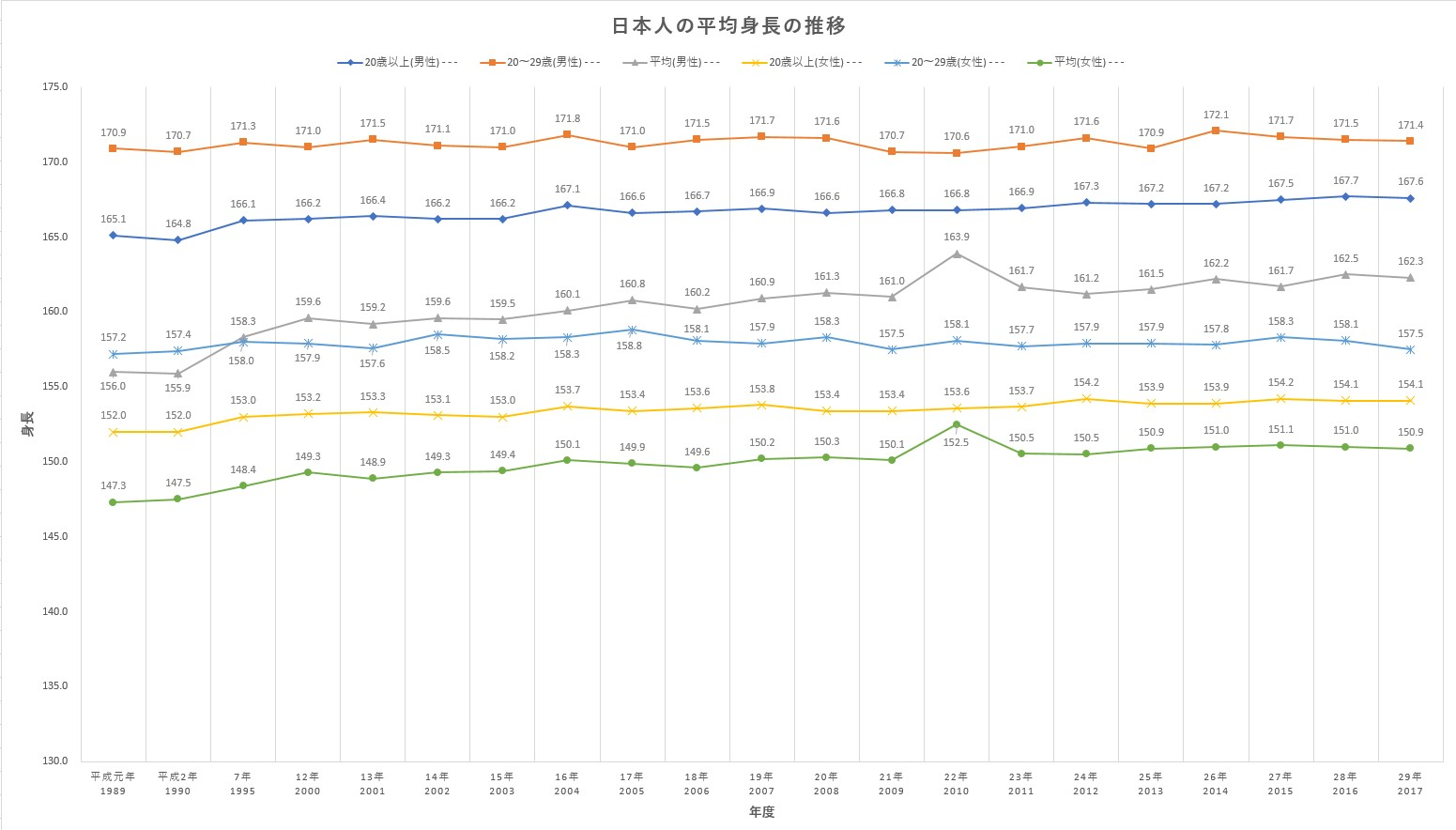 「国民健康・栄養調査 / 平成２９年国民健康・栄養調査」の「身長の平均値の年次推移（男性、年齢階級別）」と「身長の平均値の年次推移（女性、年齢階級別）」より作成